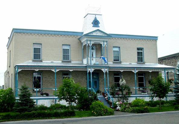 Presbytère de Saint-Pie, Québec, Canada